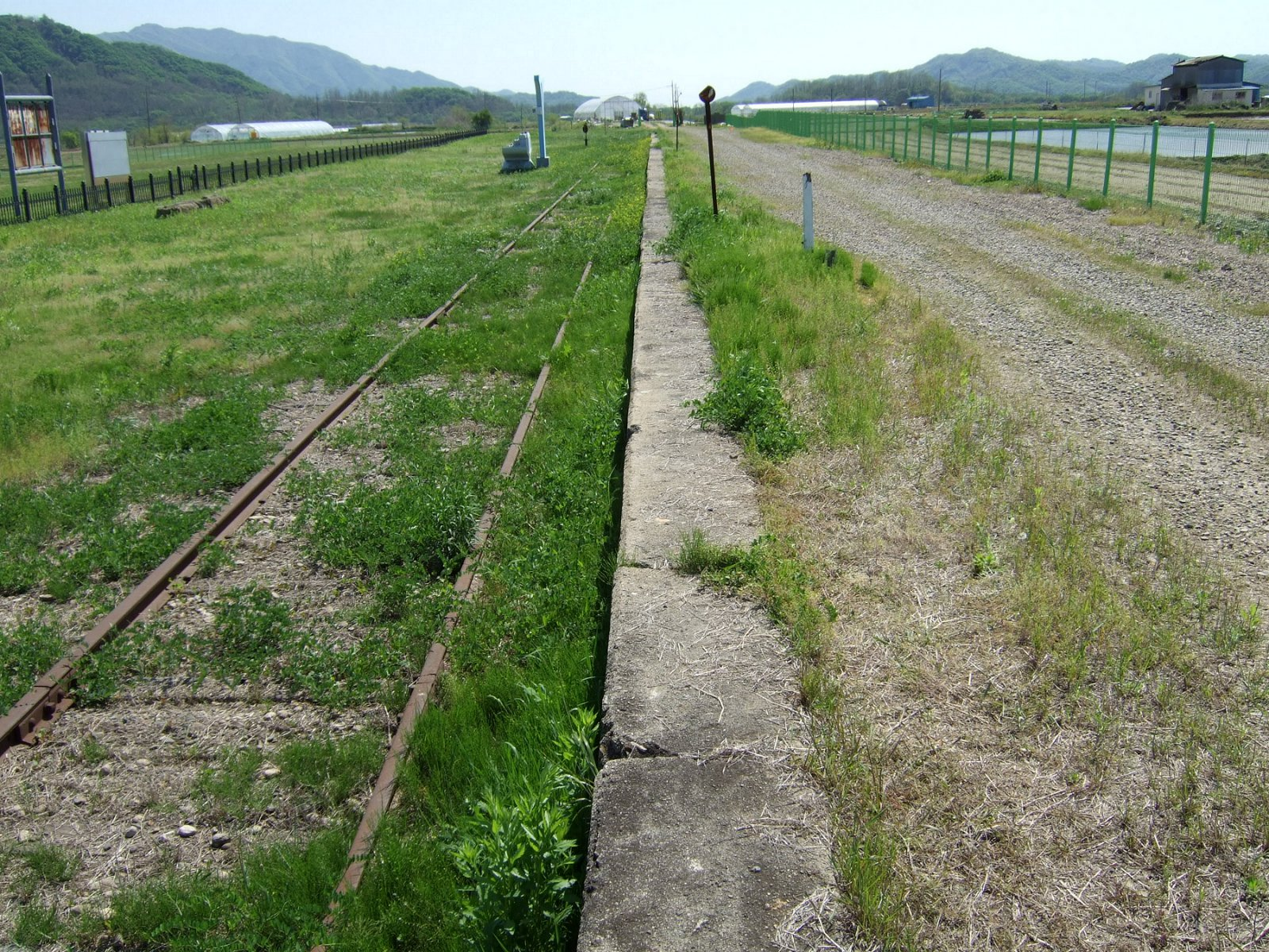 철원역 승강장 전경